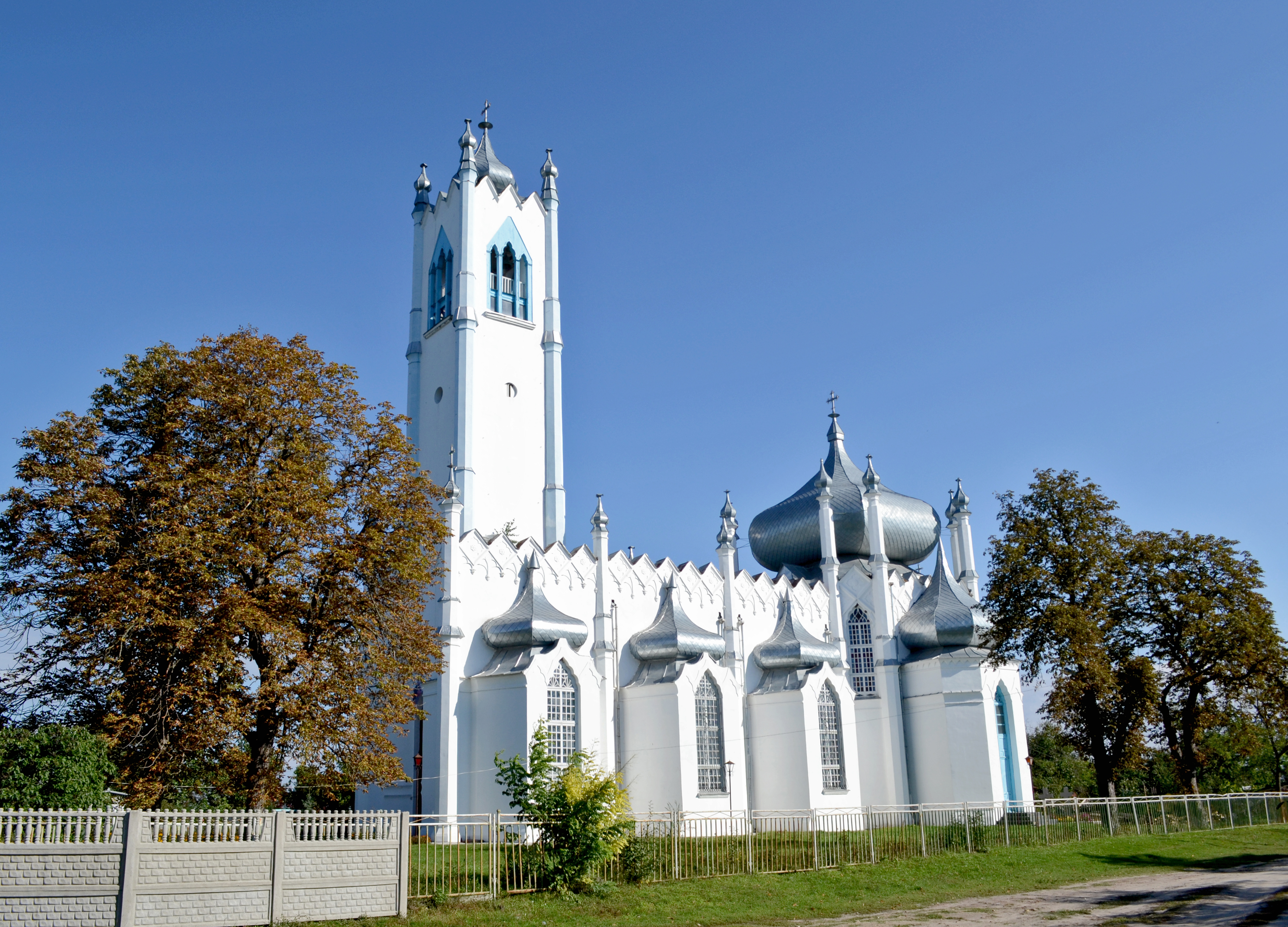 Церква Преображення (Церква Спаса Преображення Господнього) (Спасо-Преображенська церква) (мур.), Мошни